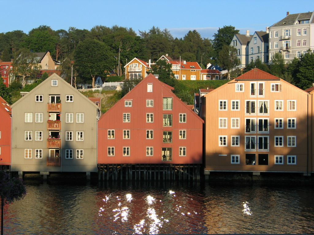 Bakklandet in Trondheim